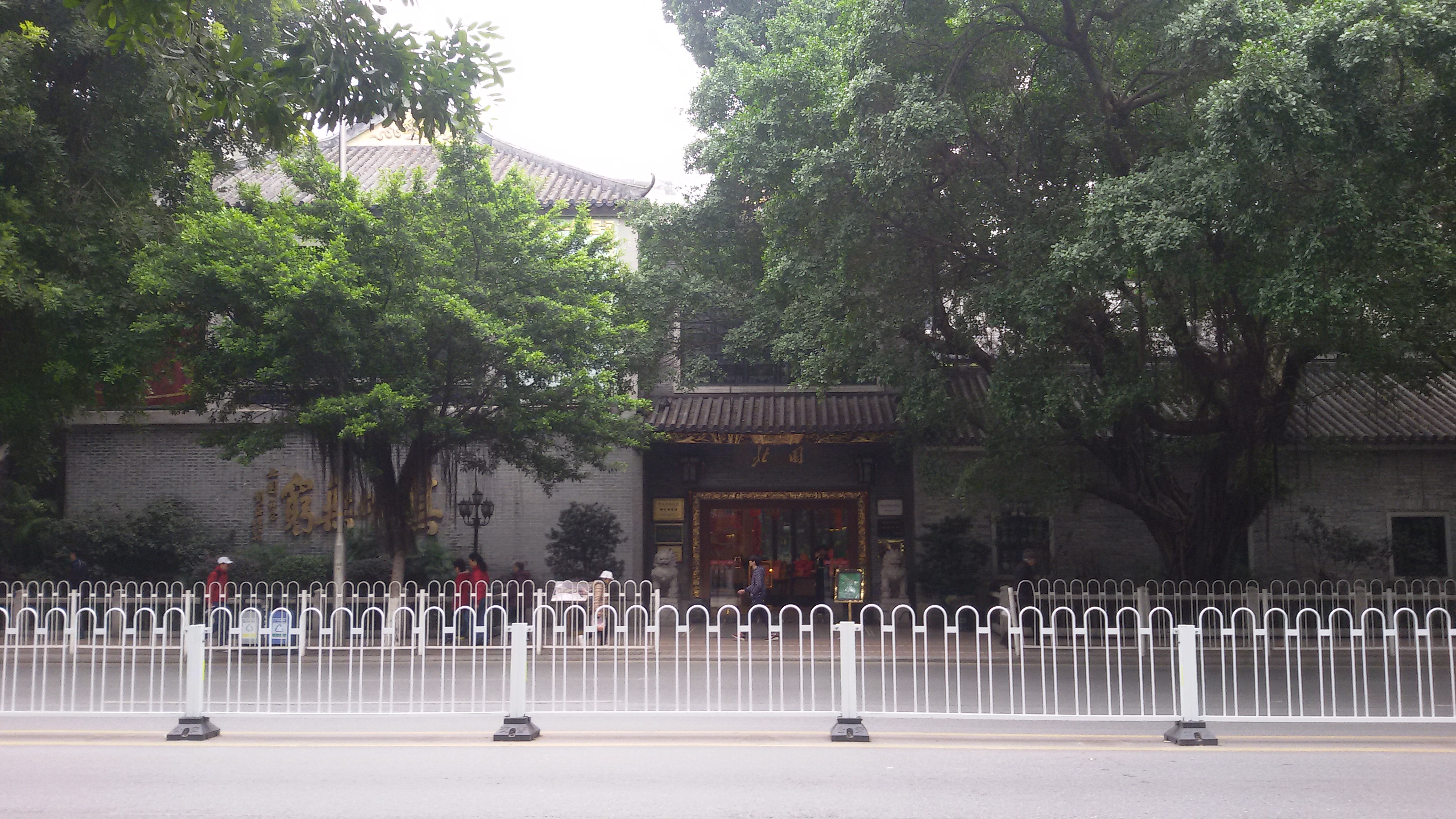 粵語: 北園酒家（廣州）